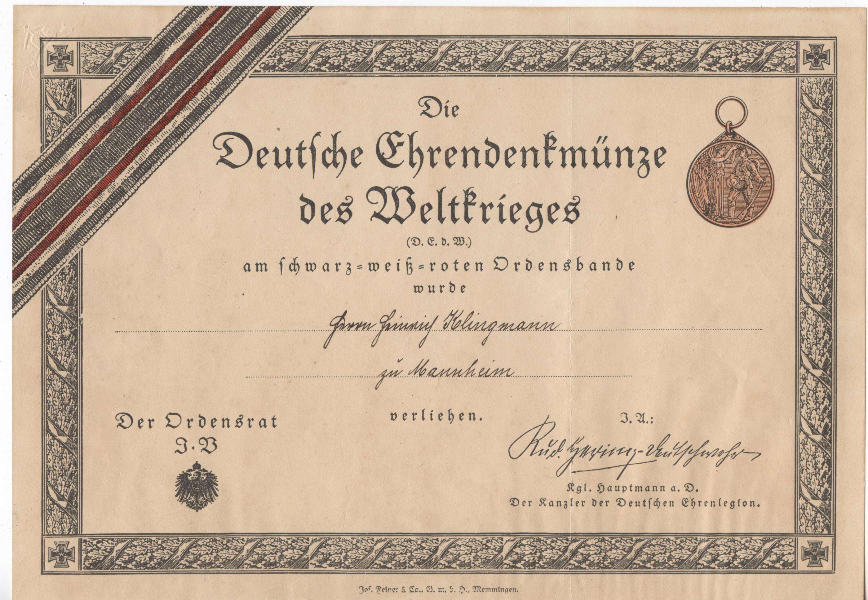 Verleihungsurkunde Deutsche Ehrendenkmünze des Weltkriegs, am schwarz-weiß-roten Ordensband ohne Kampfabzeichen (Deutsche Ehrenlegion).